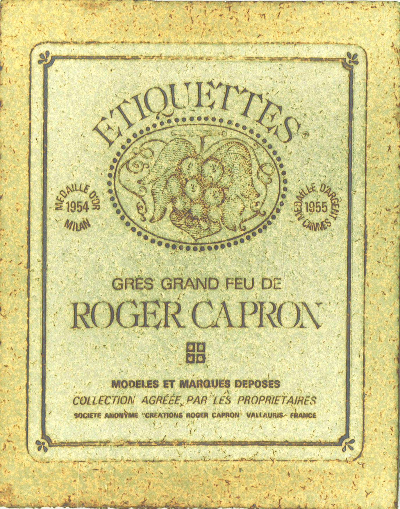 Photo d'un carreau Etiquette de la collection CApron